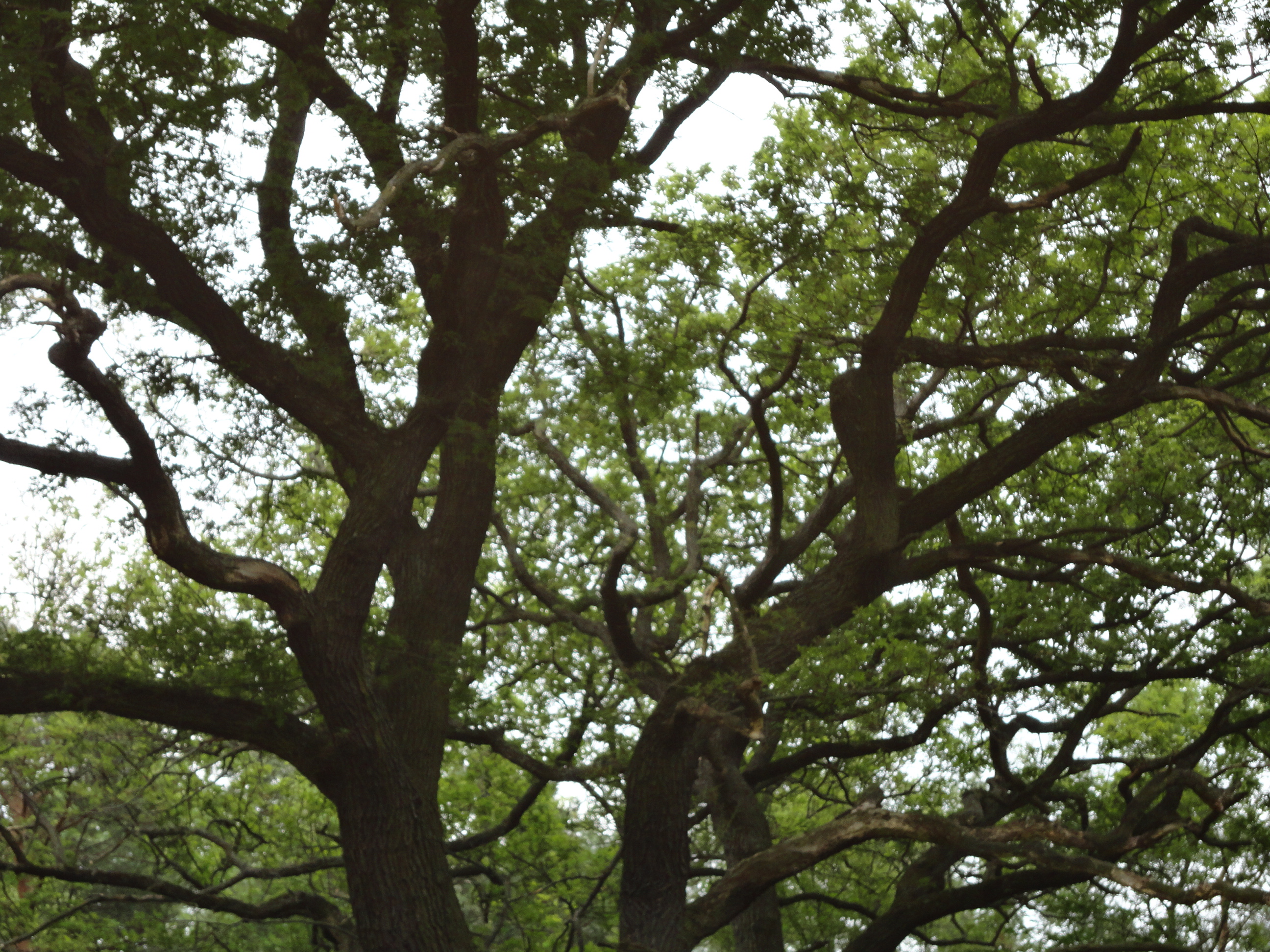 Mehrere Baumgruppen aus Flaumeichen (Quercus pubescens) This media shows the natural monument in Vienna with the ID 60.